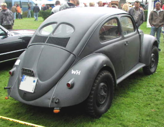 Volkswagen Käfer (Beetle) Type 82